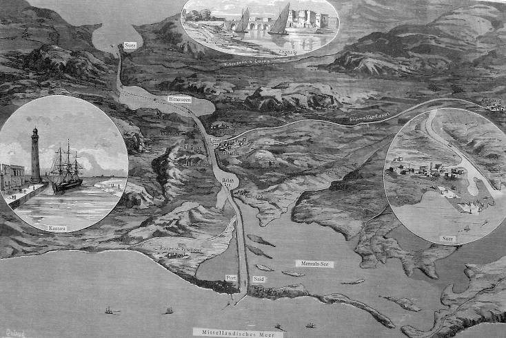 Kanał Sueski. Drzeworyt z 1882 roku. Po prawej stronie widoczny kanał słodkiej wody prowadzący z Zagazig do bazy Ismailia.